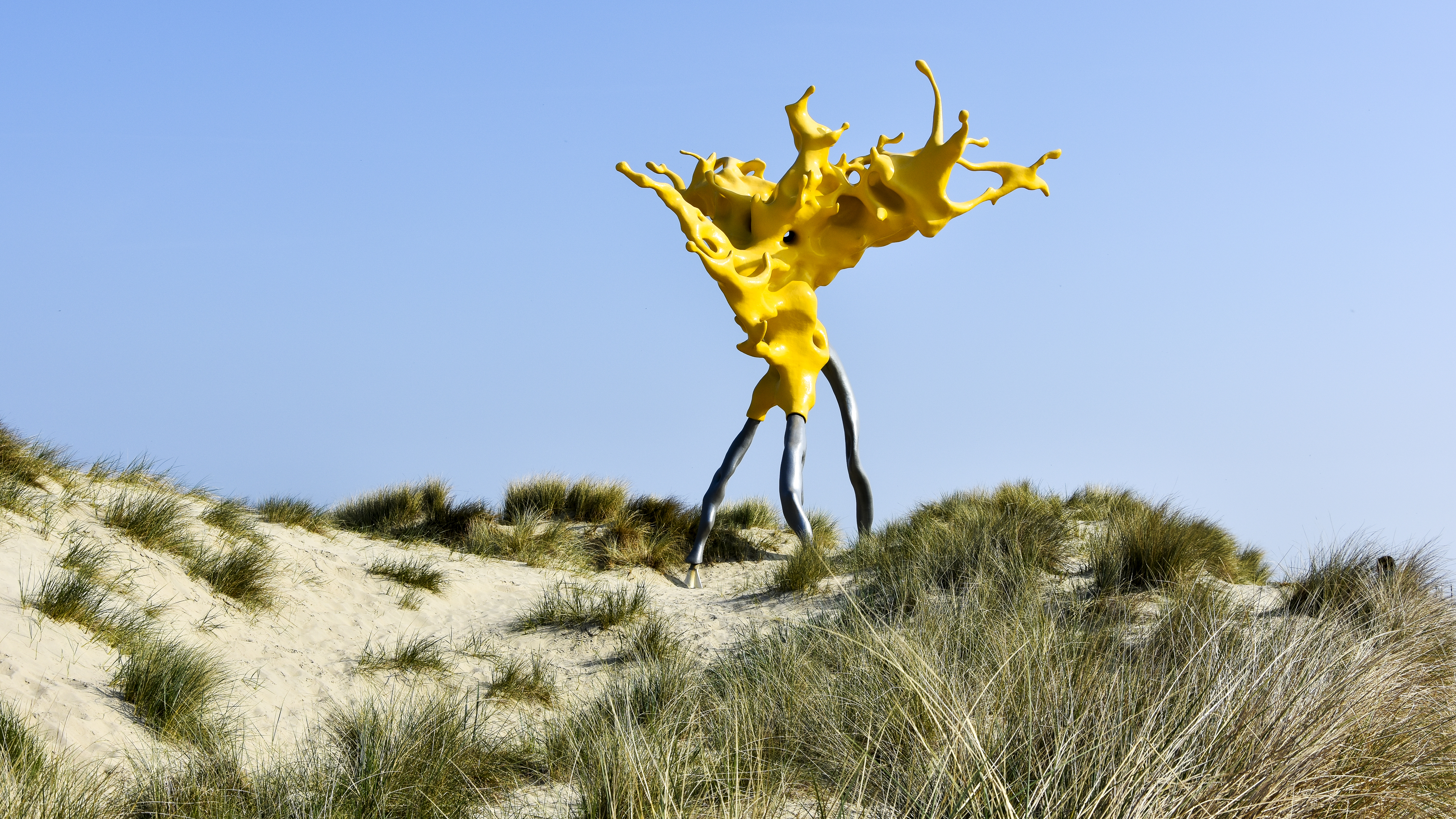 Nick Ervinck (1981) Olnetop (2012) Westende